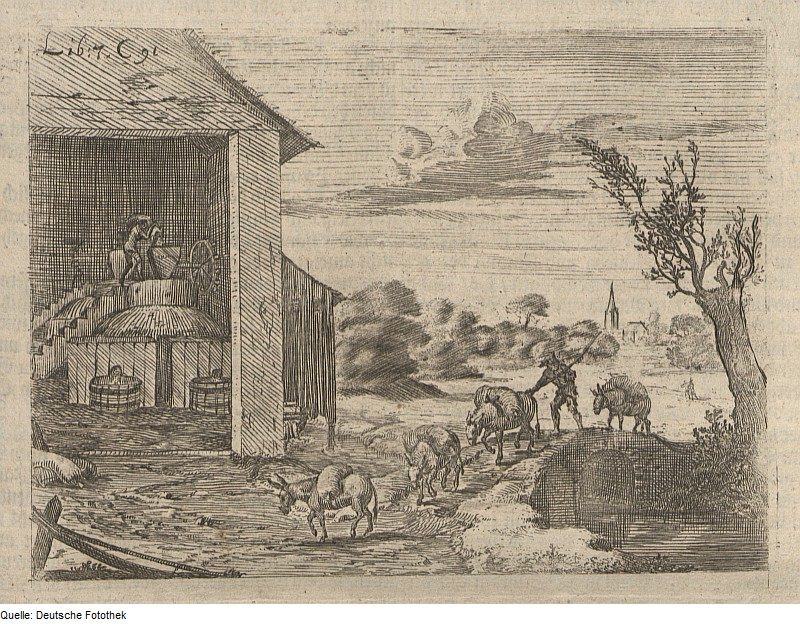 Original image description from the Deutsche Fotothek Landwirtschaft & Getreide & Mahlen & Mühle